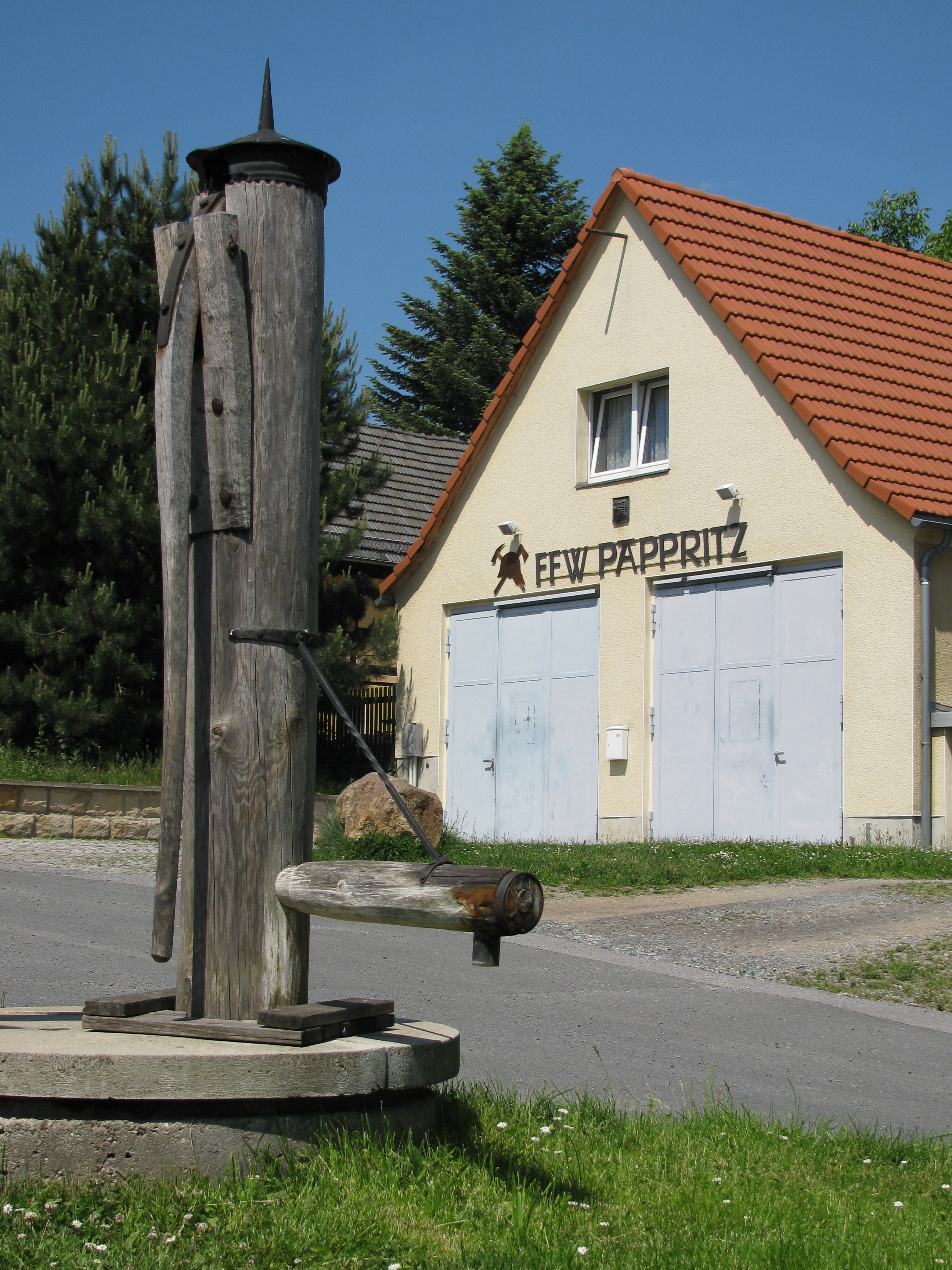 Pumpe vor dem Gebäude der Freiwilligen Feuerwehr (FFW) in Pappritz, Ortsteil von Dresden